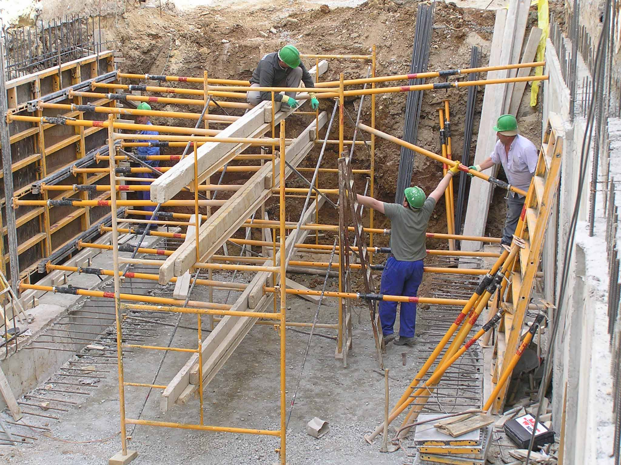 Andamios para la sujeción del terreno. Estremeñu: Trebahaoris de la costrución haziendu un holhau.